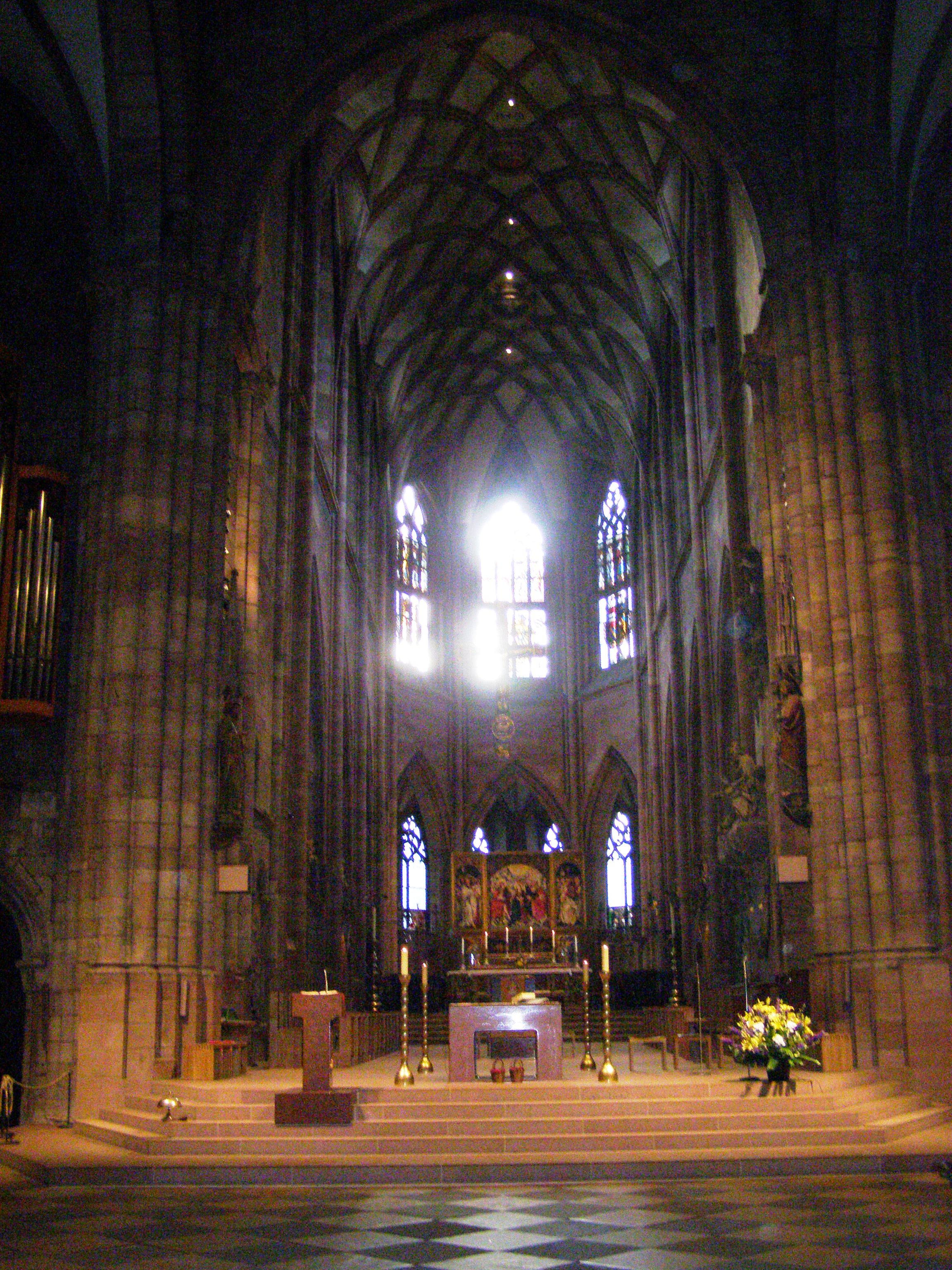 Prezbiterium katedry Najświętszej Marii Panny we Fryburgu Bryzgowijskim